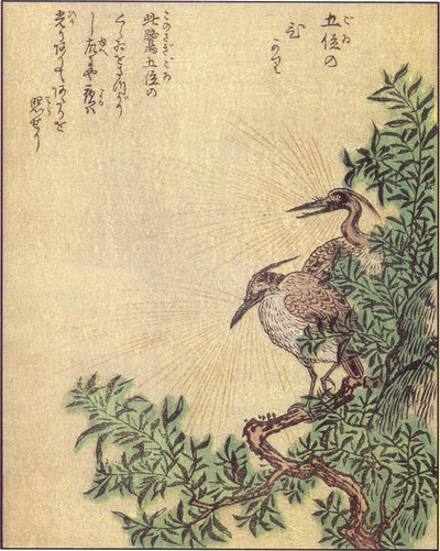 Goi-no-hikari (五位の光) from the Ehon Hyaku monogatari (絵本百物語)